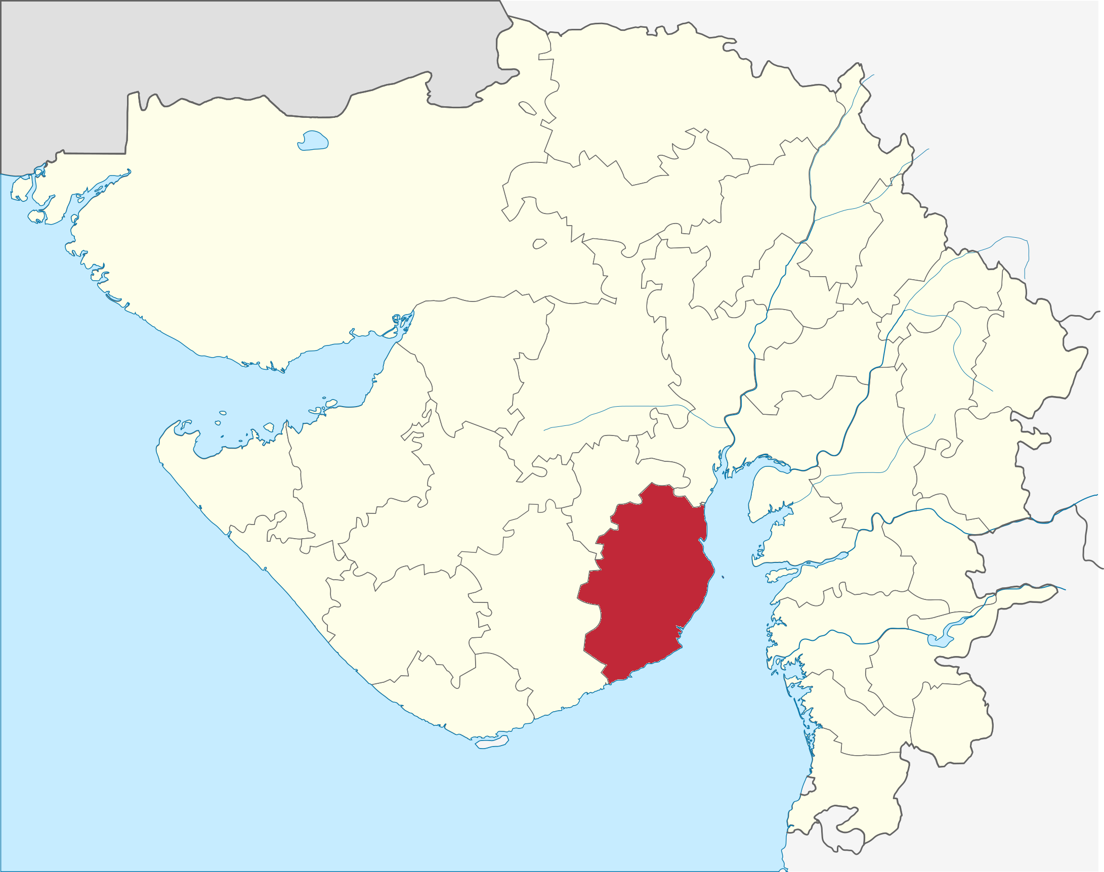 Distrito de Bhavnagar en Gujarat